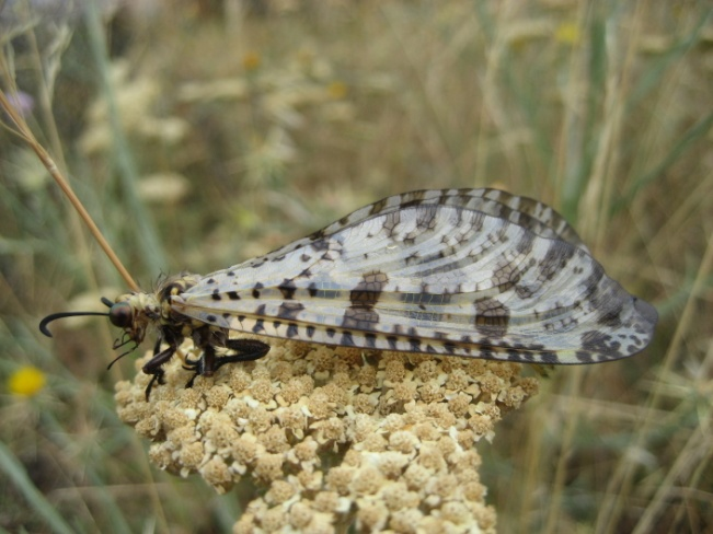 Qarışqa aslanının yetkin fərdi (Foto İ.Q.Kərimova)